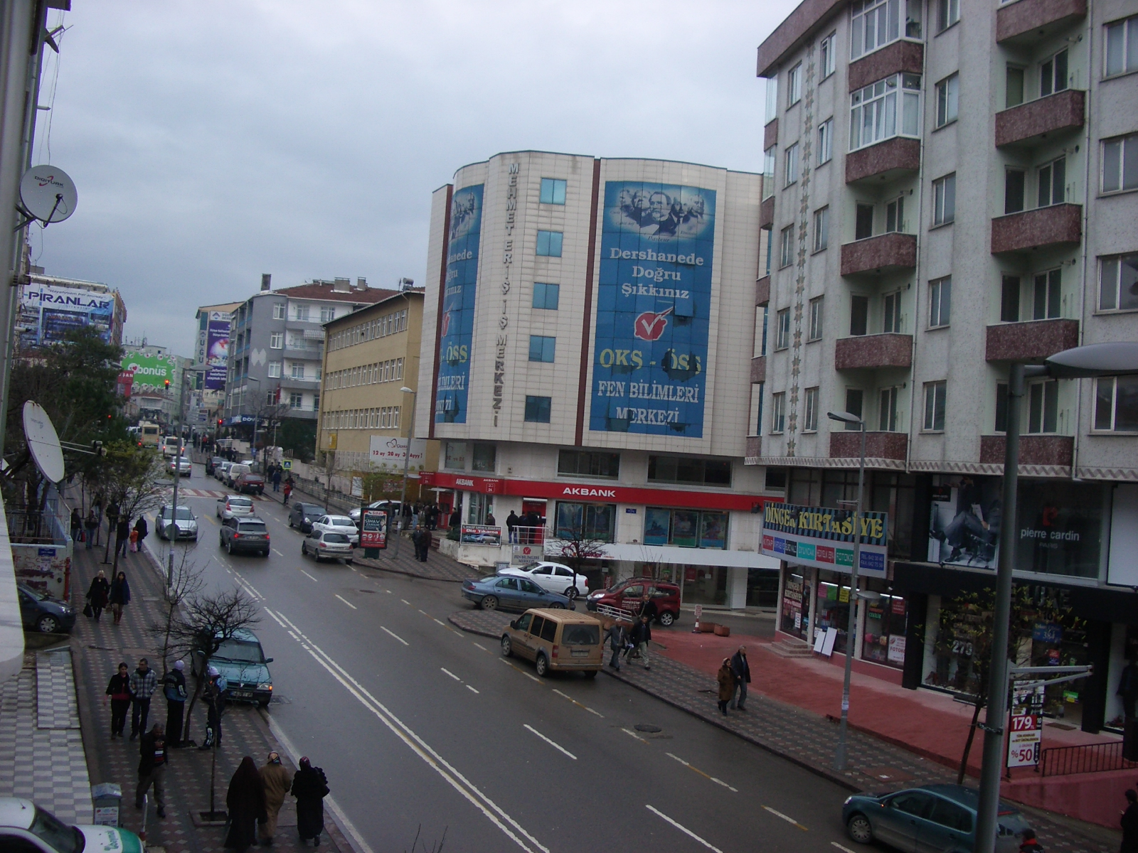 Atatürk cd